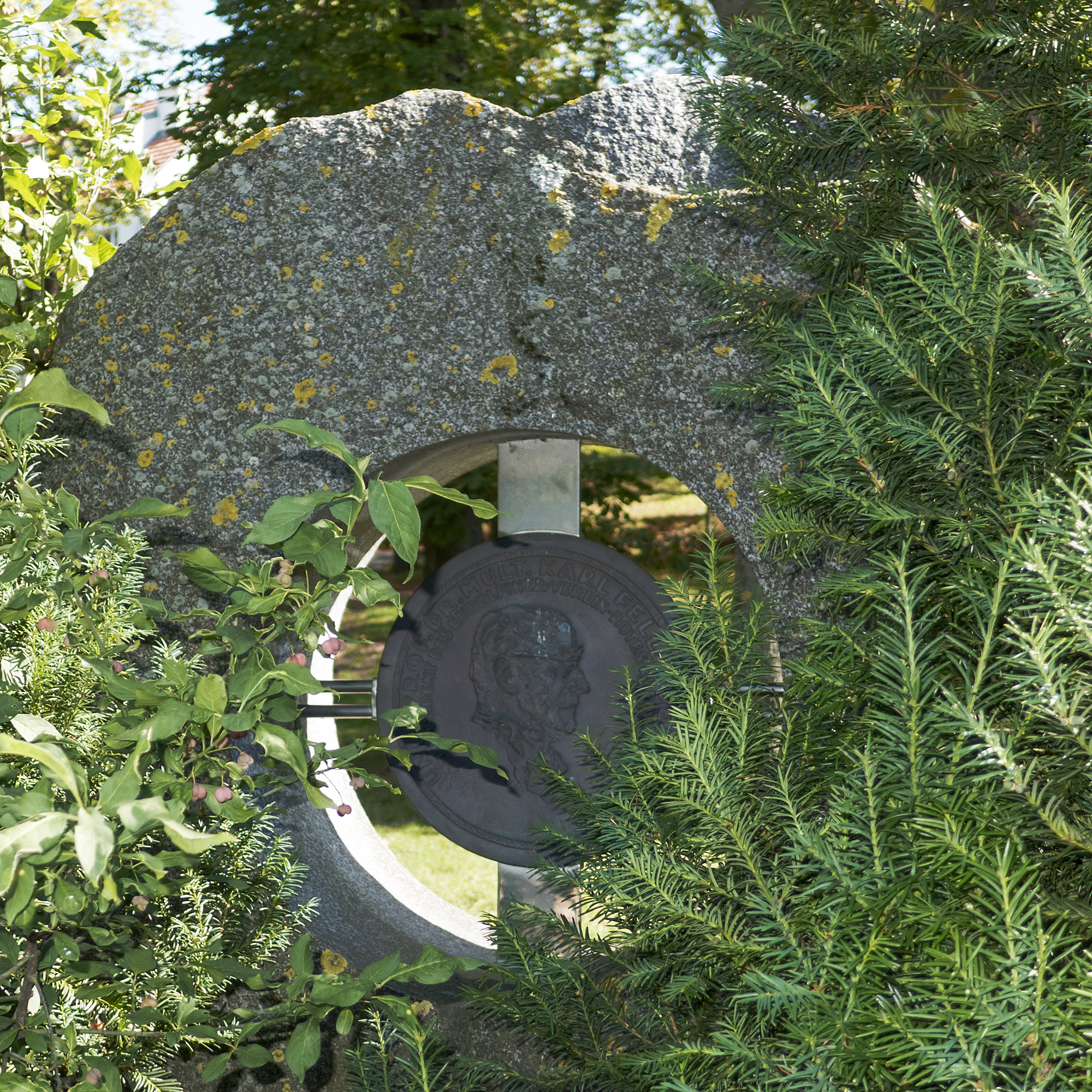 Karl-Fellinger-Park in Wien 19. Relief von Hubert Wilfan, 1999.